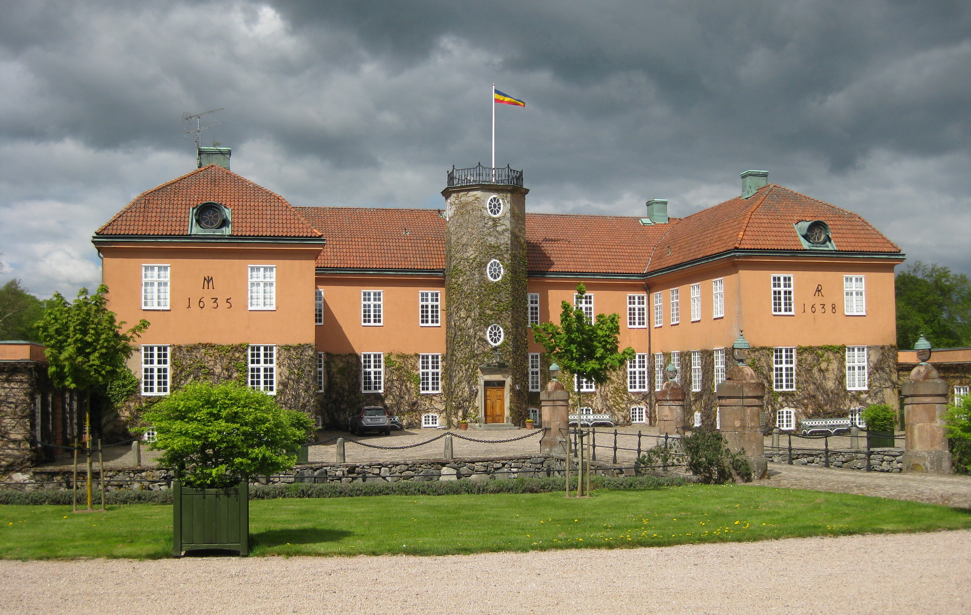 Maltesholms slott i maj 2012